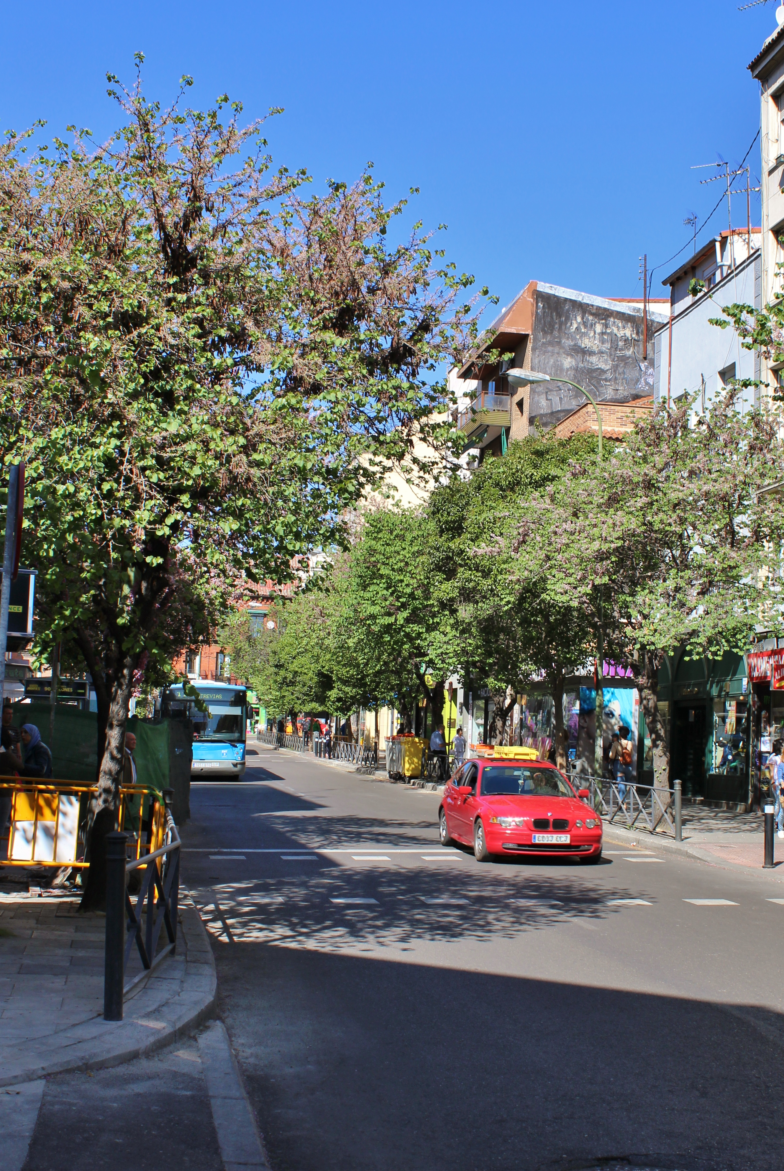 Avenida del Monte Igueldo, Madrid This is a retouched picture, which means that it has been digitally altered from its original version. Modifications: Distorted car plate.